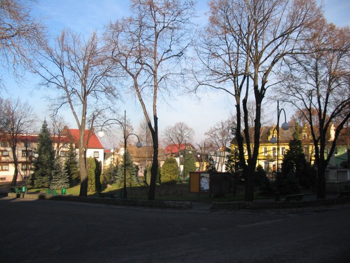 Krzanowice - Rynek